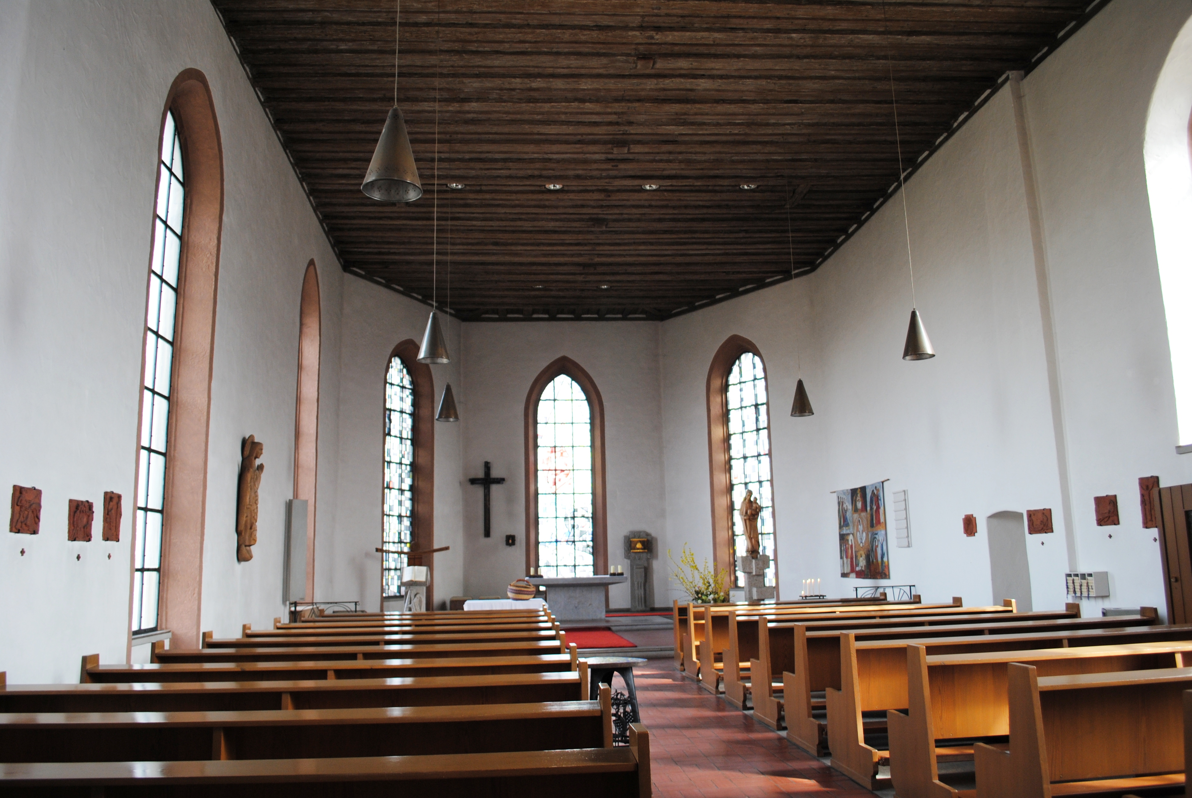 Innenraum, Vogelsburg, Volkach